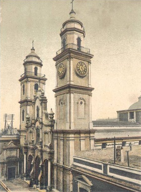 Vista de la Iglesia de San Ignacio de Loyola en Buenos Aires. Vista desde la calle Bolívar en la esquina con la calle Potosí (hoy llamada Adolfo Alsina) tomada hacia 1900 por el fotógrafo Eugenio Avanzi.